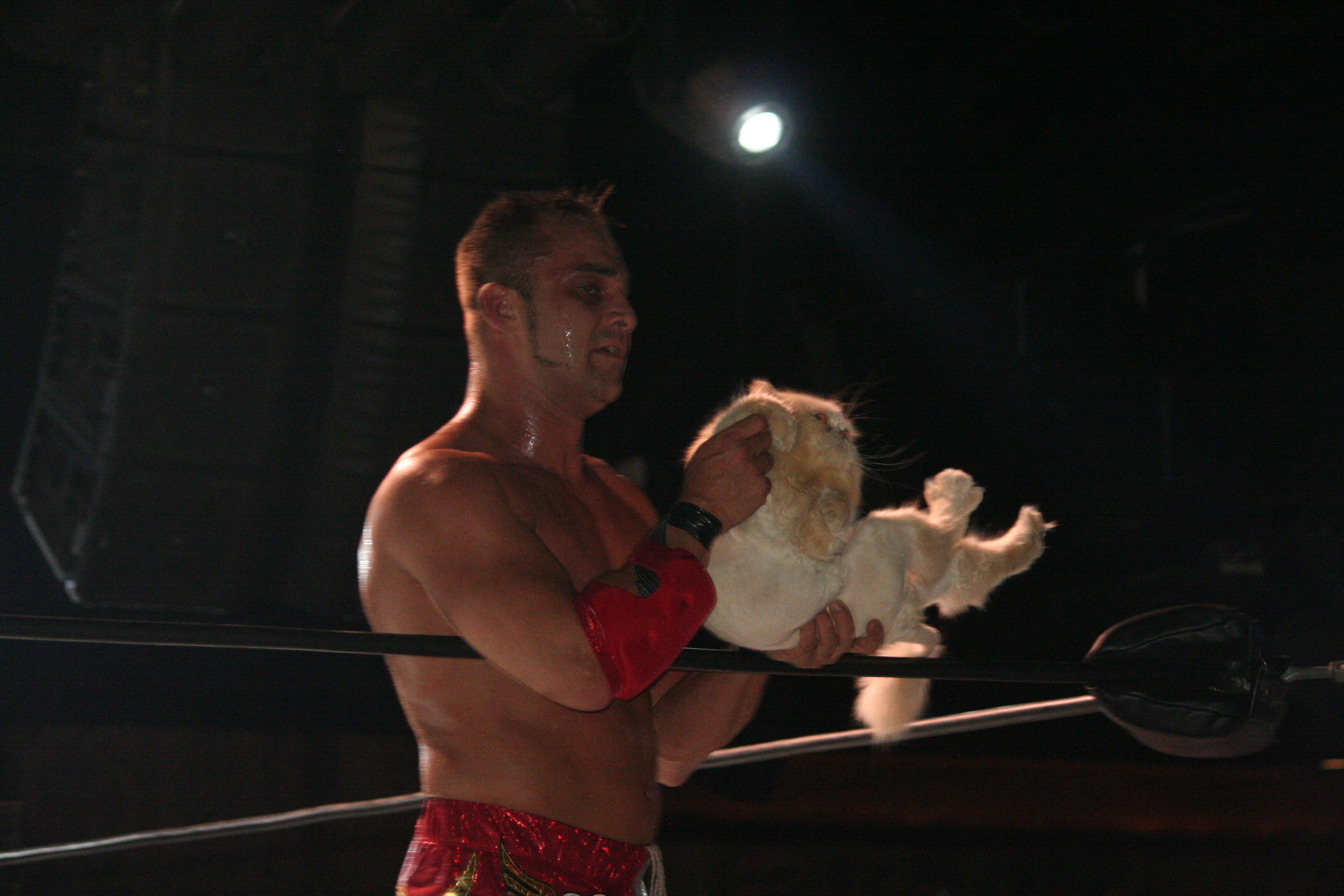 Teddy Hart